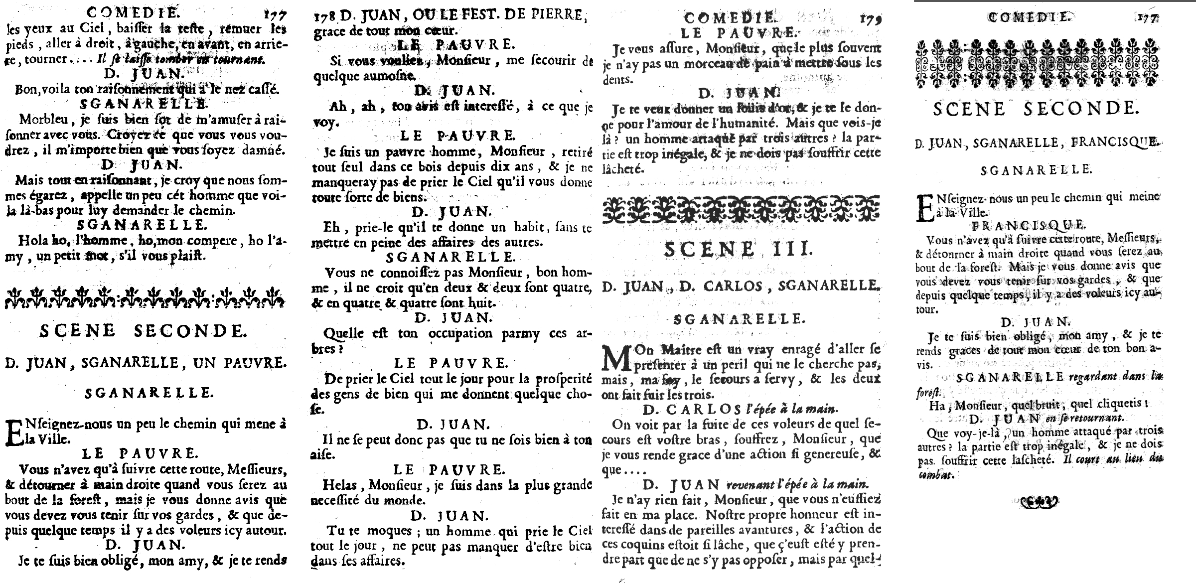 La scène du pauvre, Paris 1682, dans ses deux états